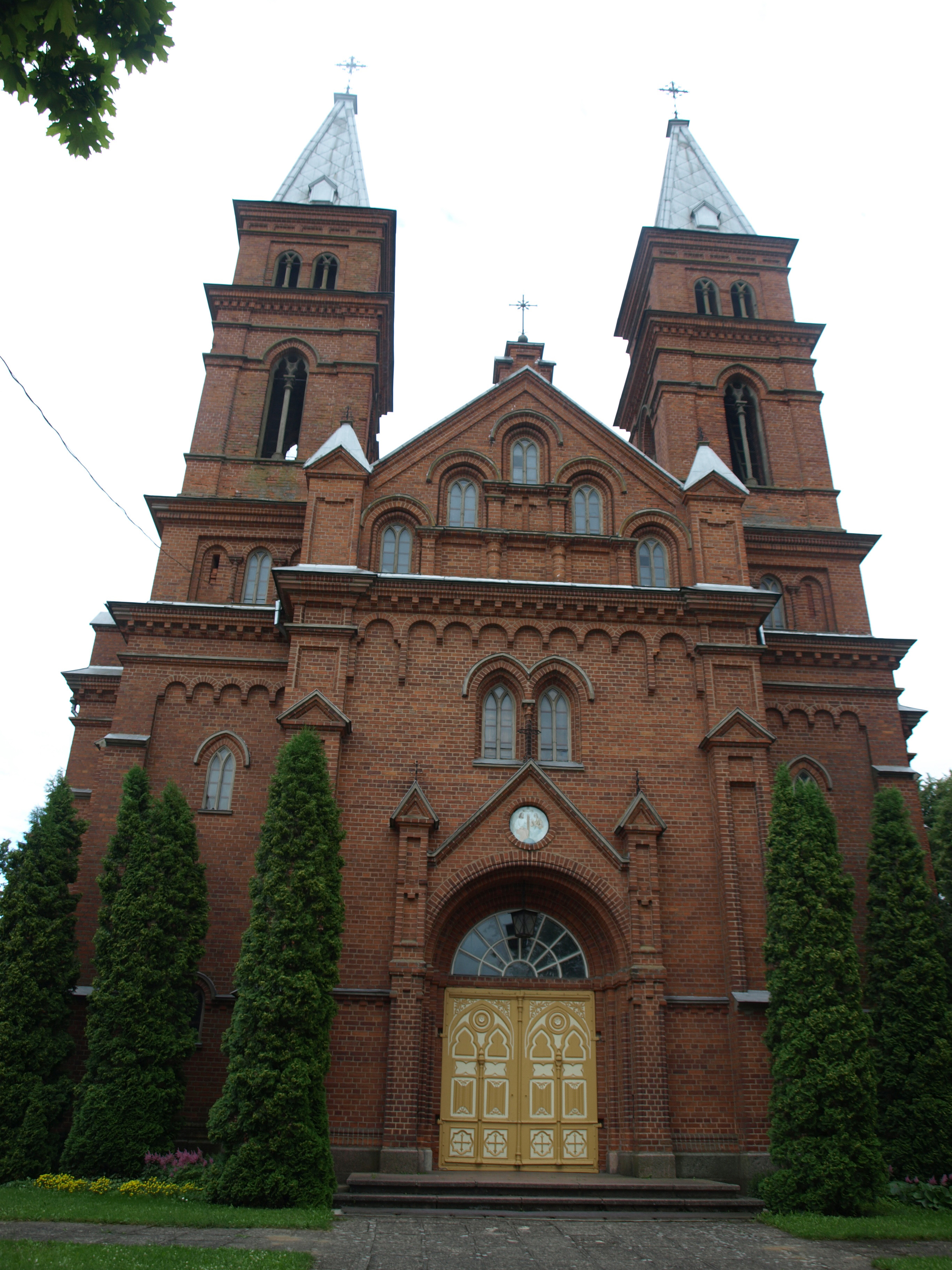 Užpaliai church